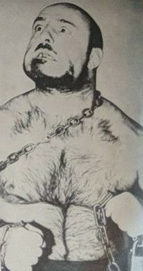 Red Lyons dans un programme de catch du 26 avril 1969